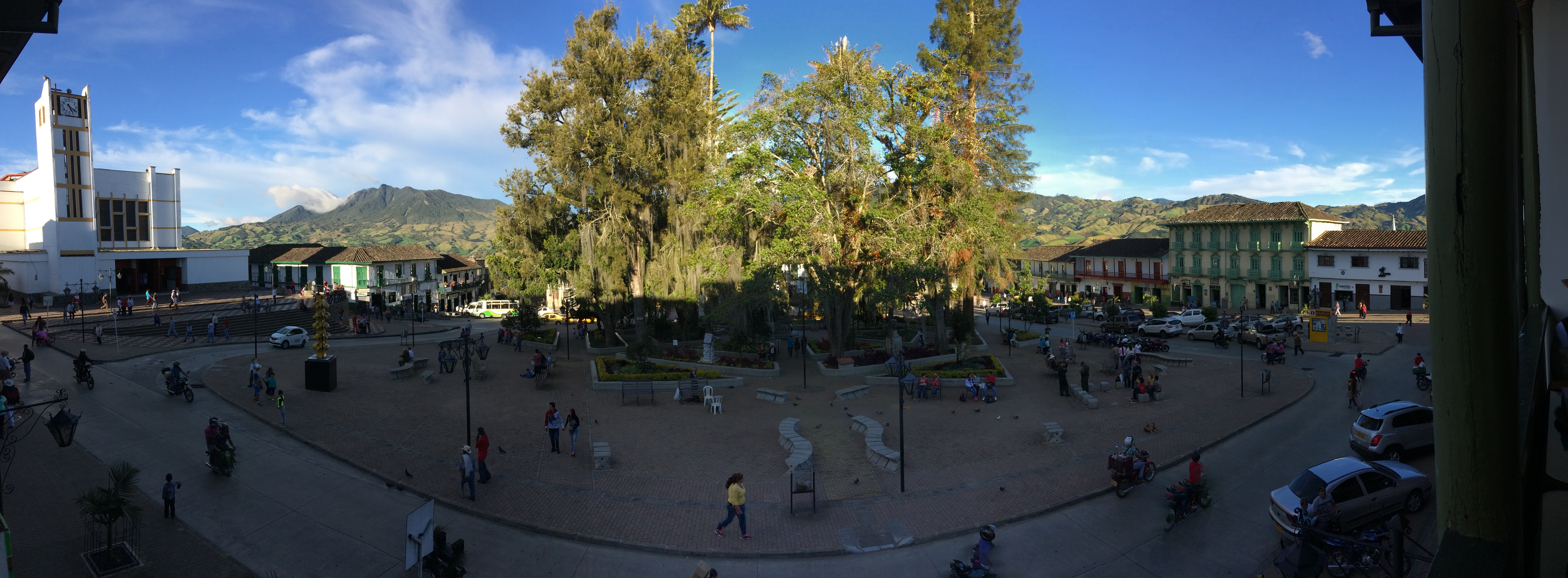 Panorámica de la Plaza de Ruíz y Zapata en Sonsón, vista desde el costado oriental.